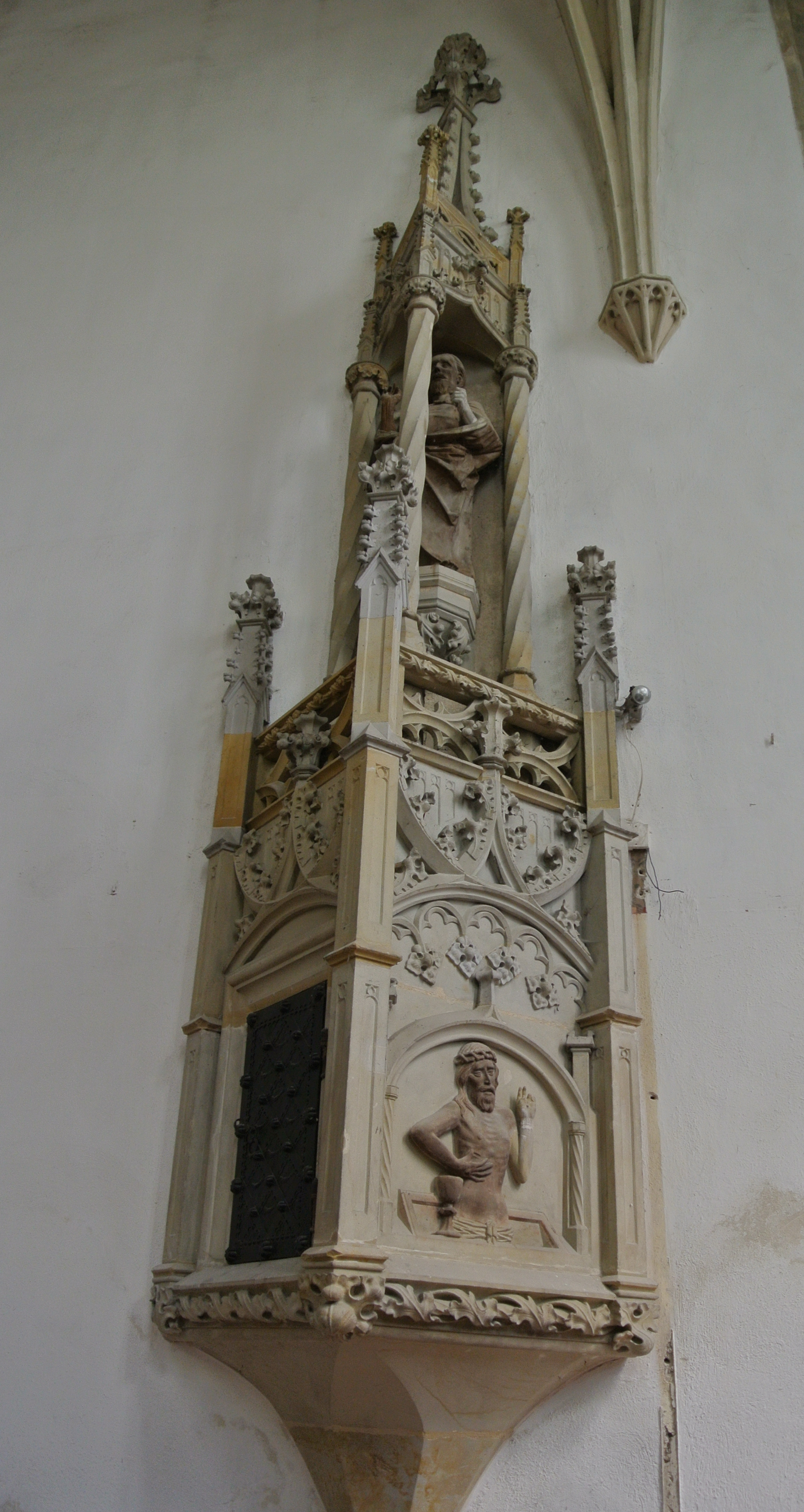 Detaily kostela v Charvatcích